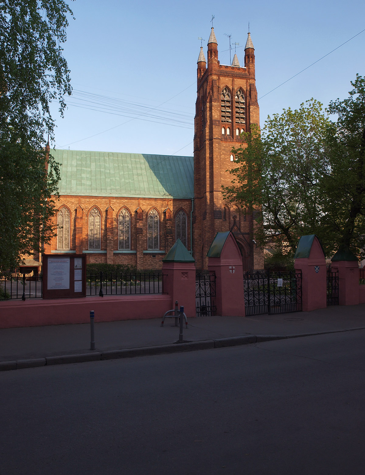 St. Andrew's Anglican Church, Moscowru:Англиканская церковь Святого Андрея (Москва)